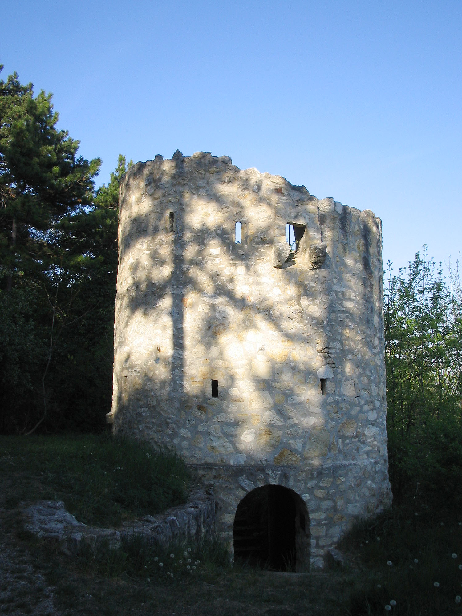 Hoehlturm in Woellersdorf in der Nachmittagssonne